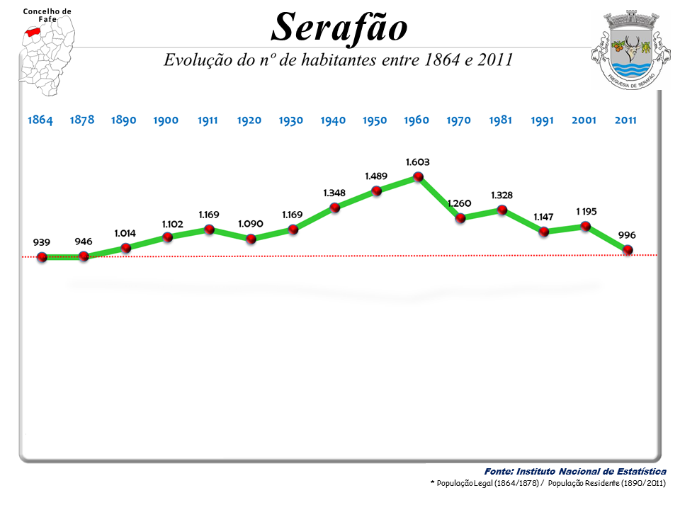 Censos 1864/2011